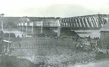 Pont de Hartland le jour de sont inauguration le 1er juillet 1901